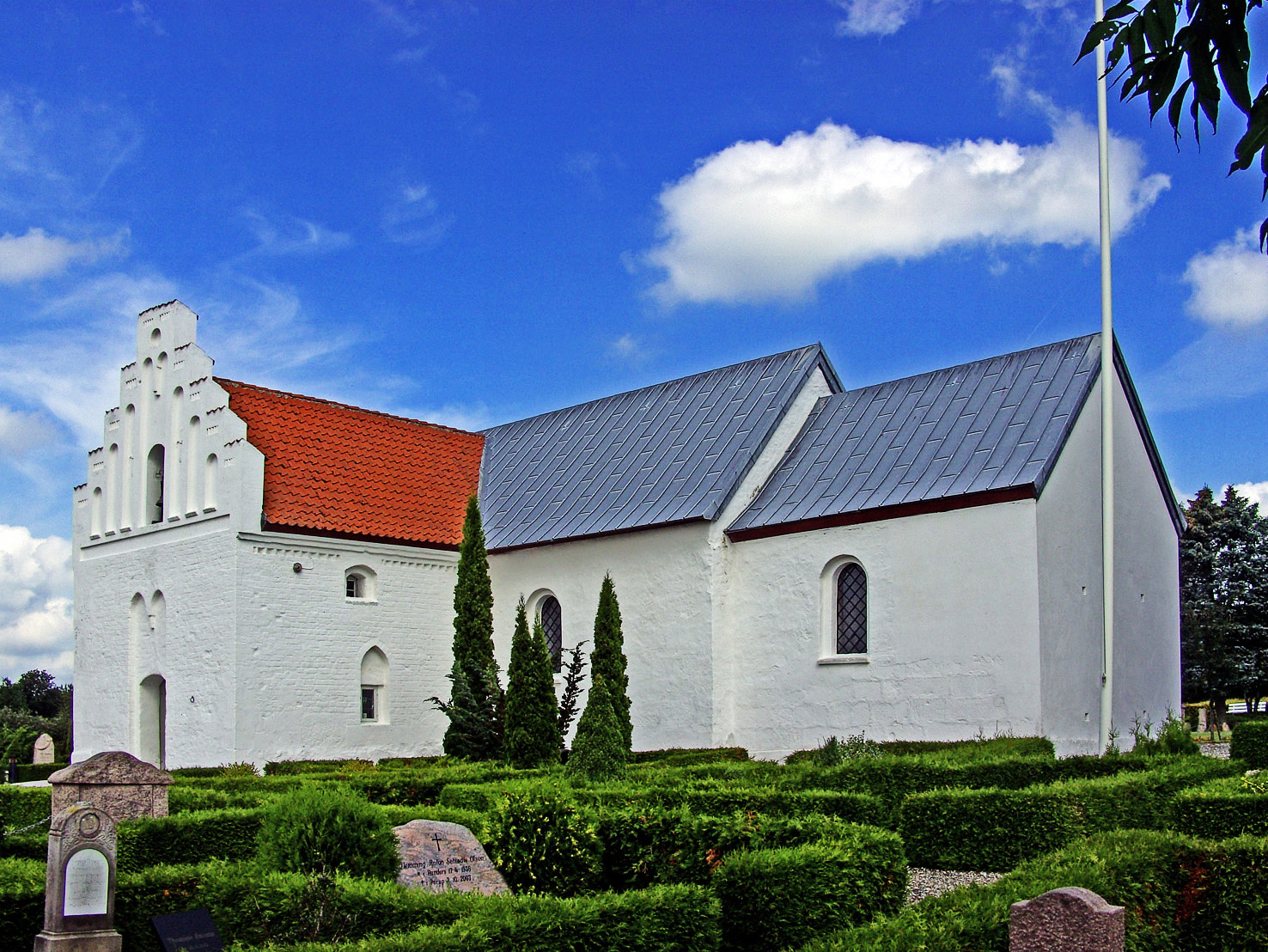 fra sydøst